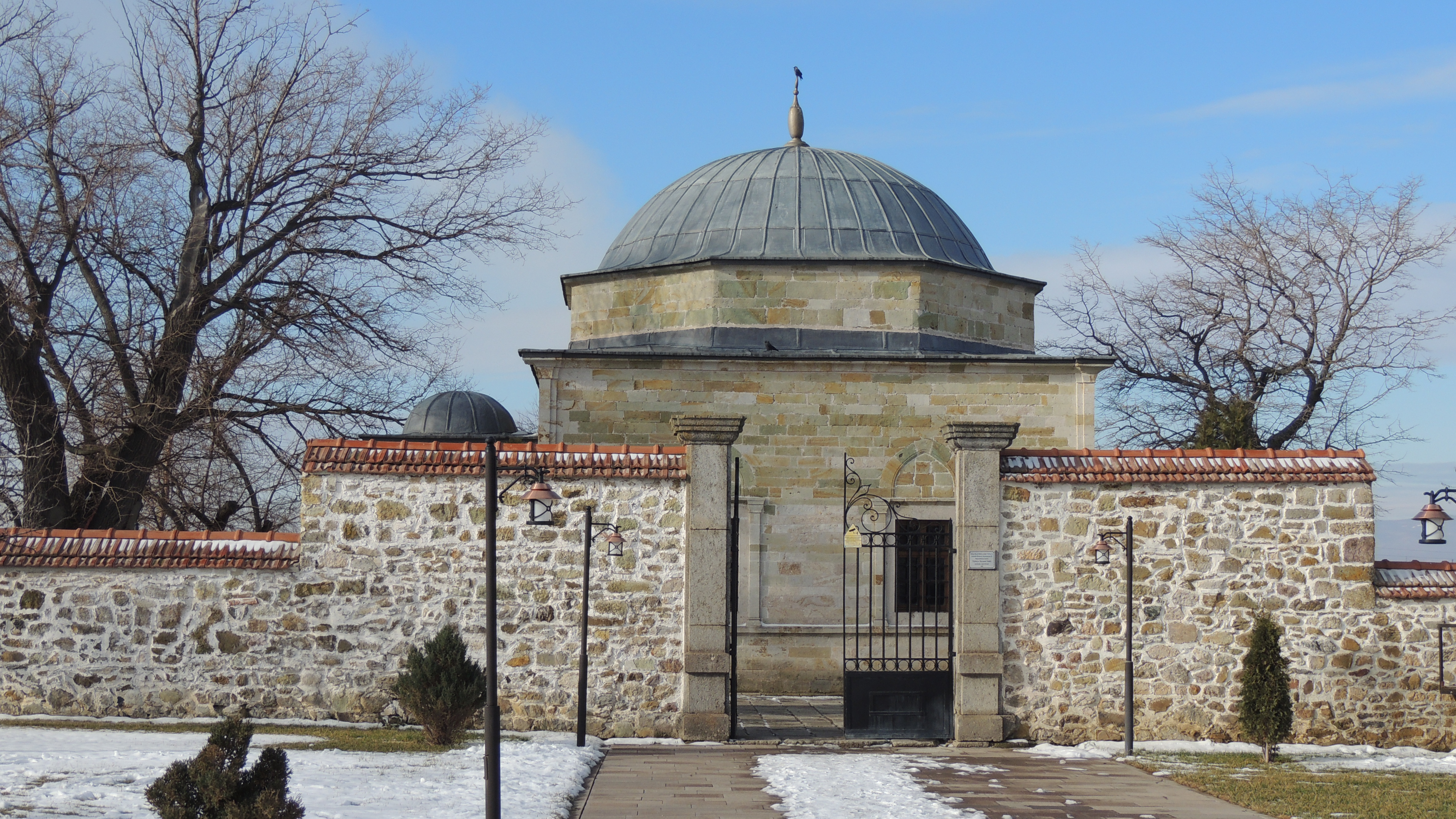 Tyrbja e Sulltan Muratit